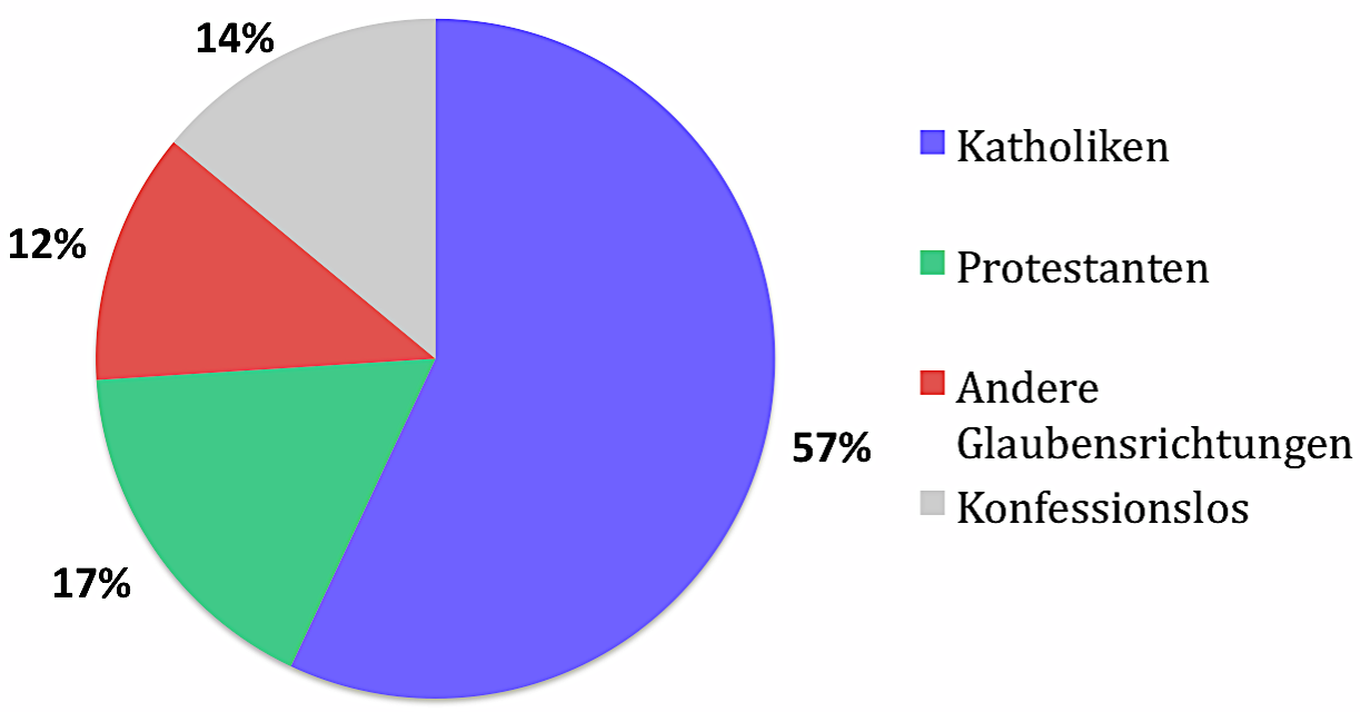 Konfessionsbild der Stadt Zug